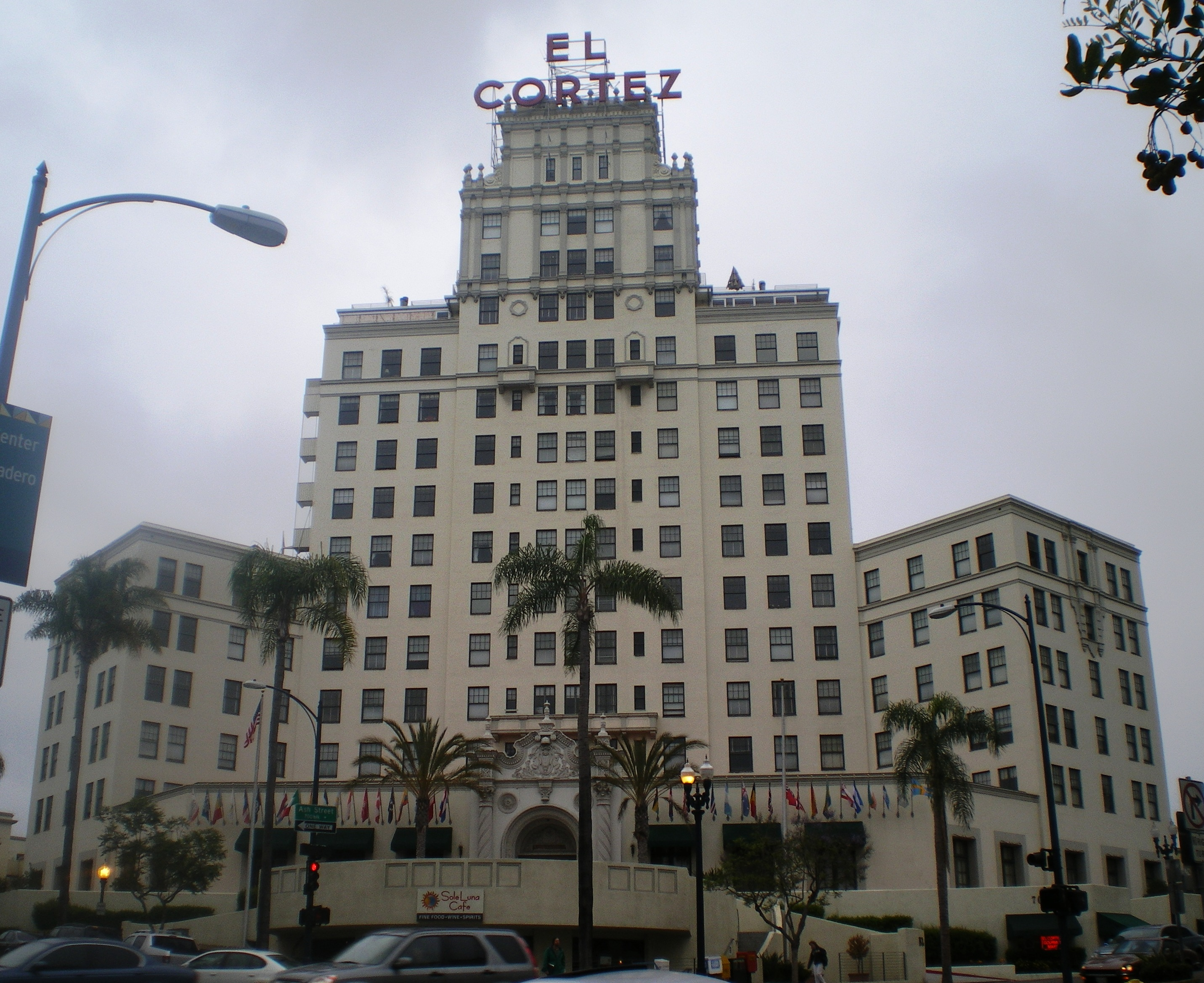 El Cortez Apartment Hotel, San Diego, California